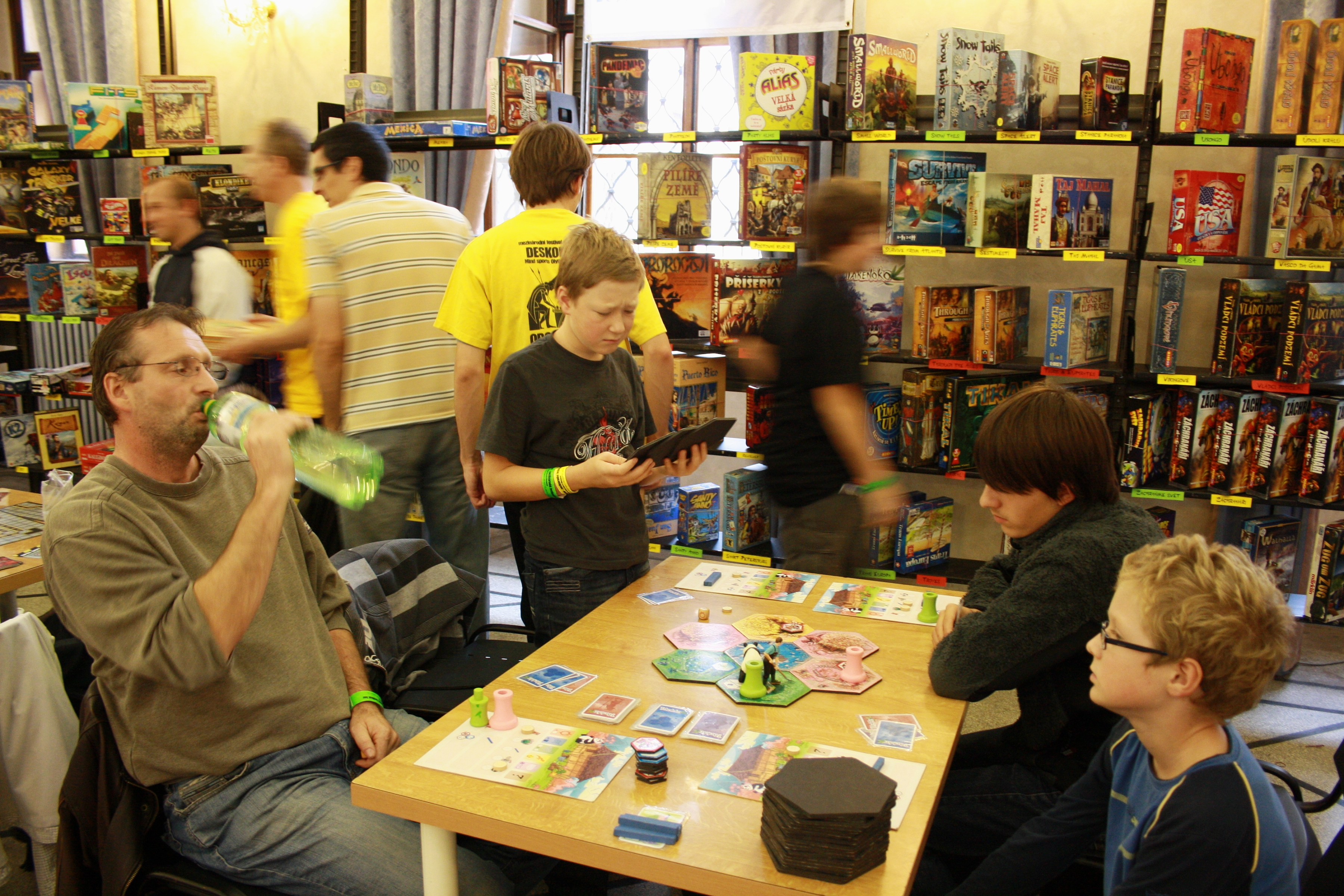 Deskohraní 2012 - Takenoko (velká demonstrační verze)